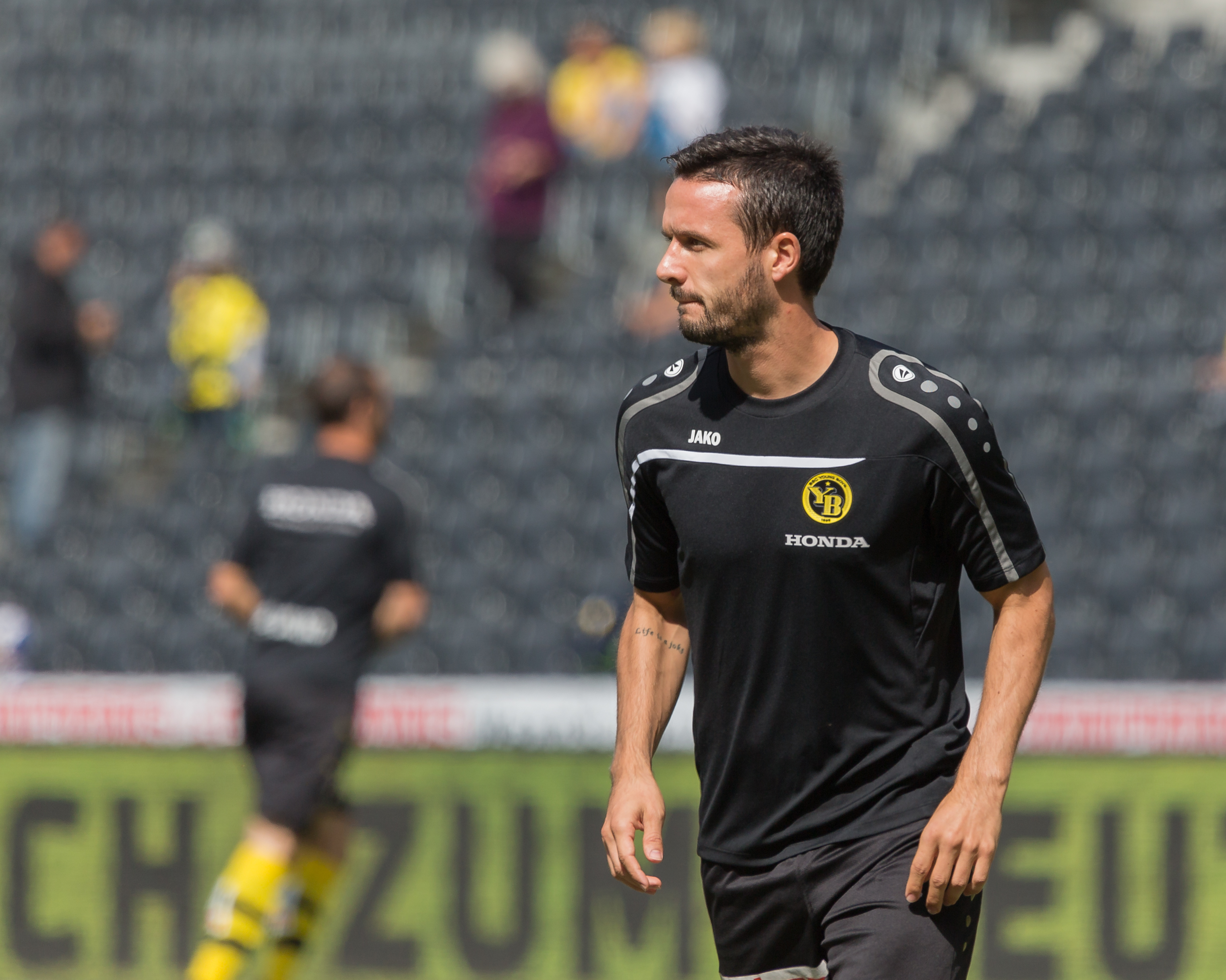 Raphaël Nuzzolo beim Spiel des BSC Young Boys gegen den FC Luzern